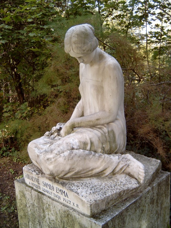 Somló Emma (Debrecen, 1877. november 23. – Budapest, 1927. október 2.) drámai színésznő sírja Budapesten. Kerepesi temető: 51-1-62. Gabay Sándor alkotása